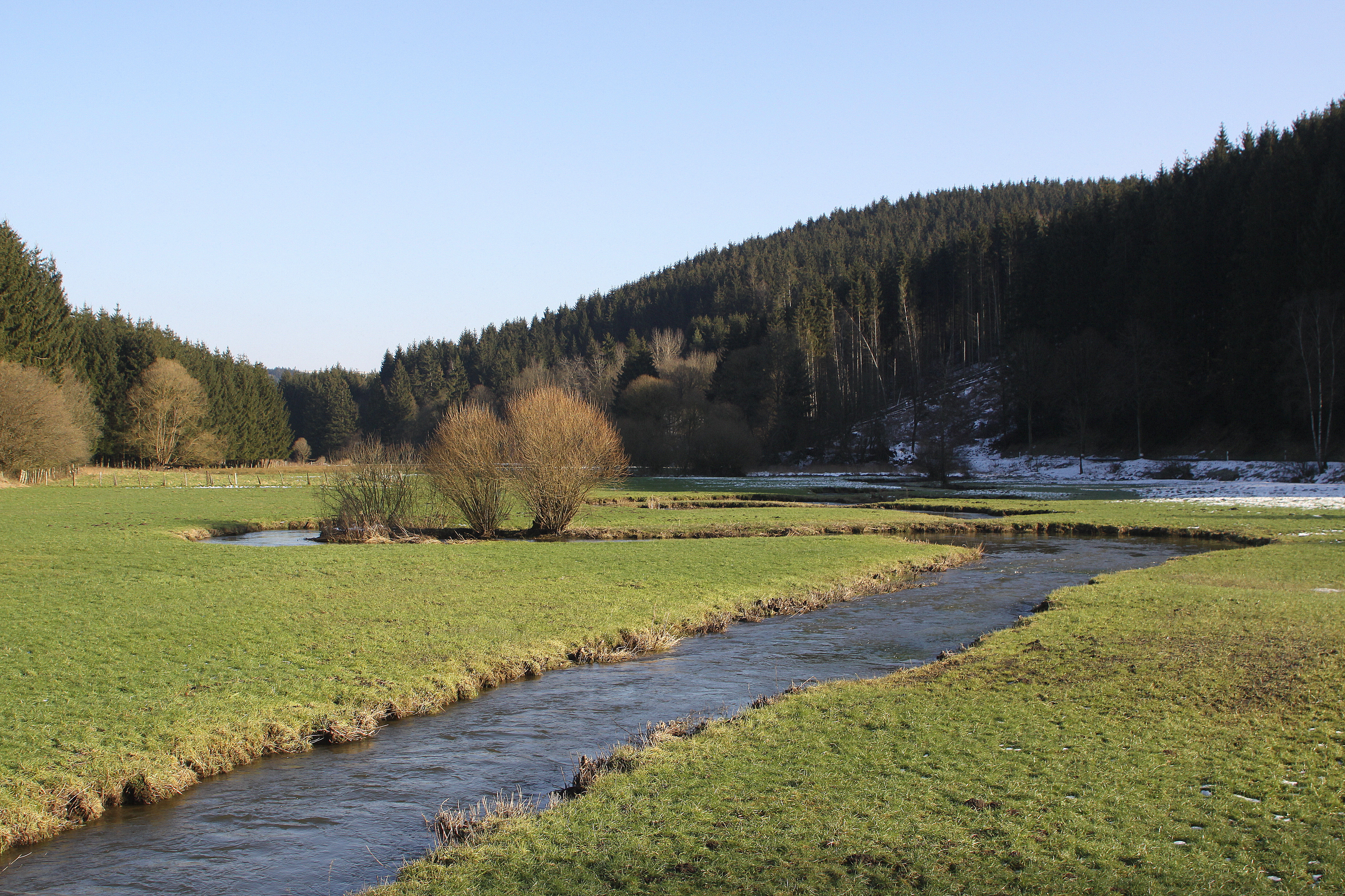 D'Trëtterbaach zu Saassel